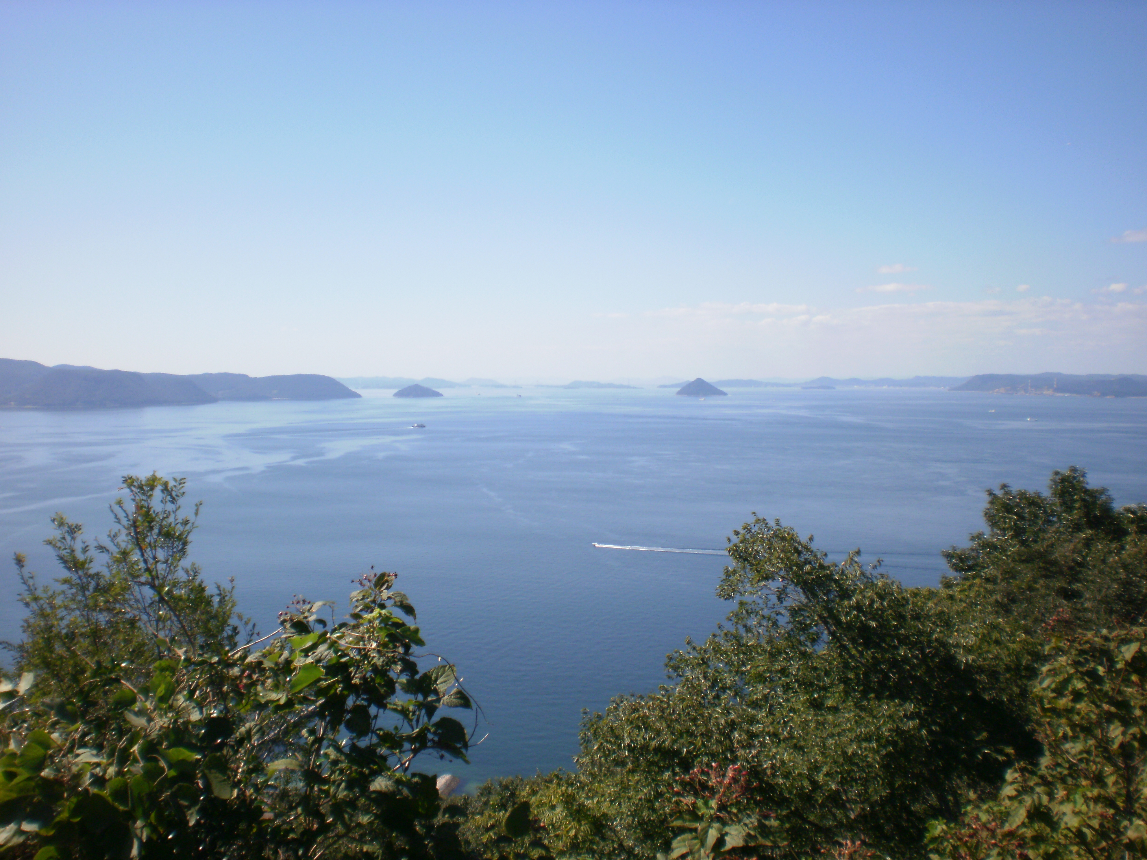 女木島 009